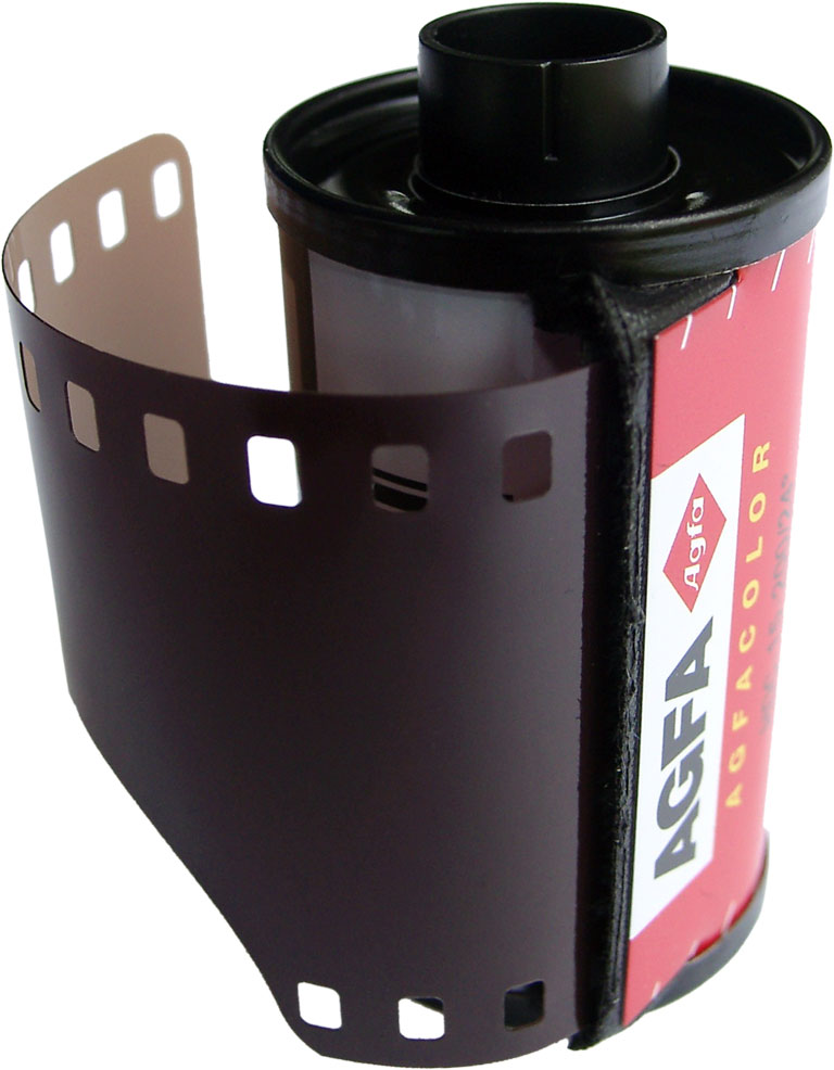 Kleinbildfilm für Standbilder in Filmpatrone von Agfa.